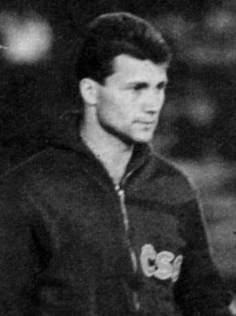 EM-kisojen palkintojenjako Belgradissa 1962. Vasemmalla Rudolf Tomášek keskellä Pentti Nikula ja oikealla Kauko Nyström